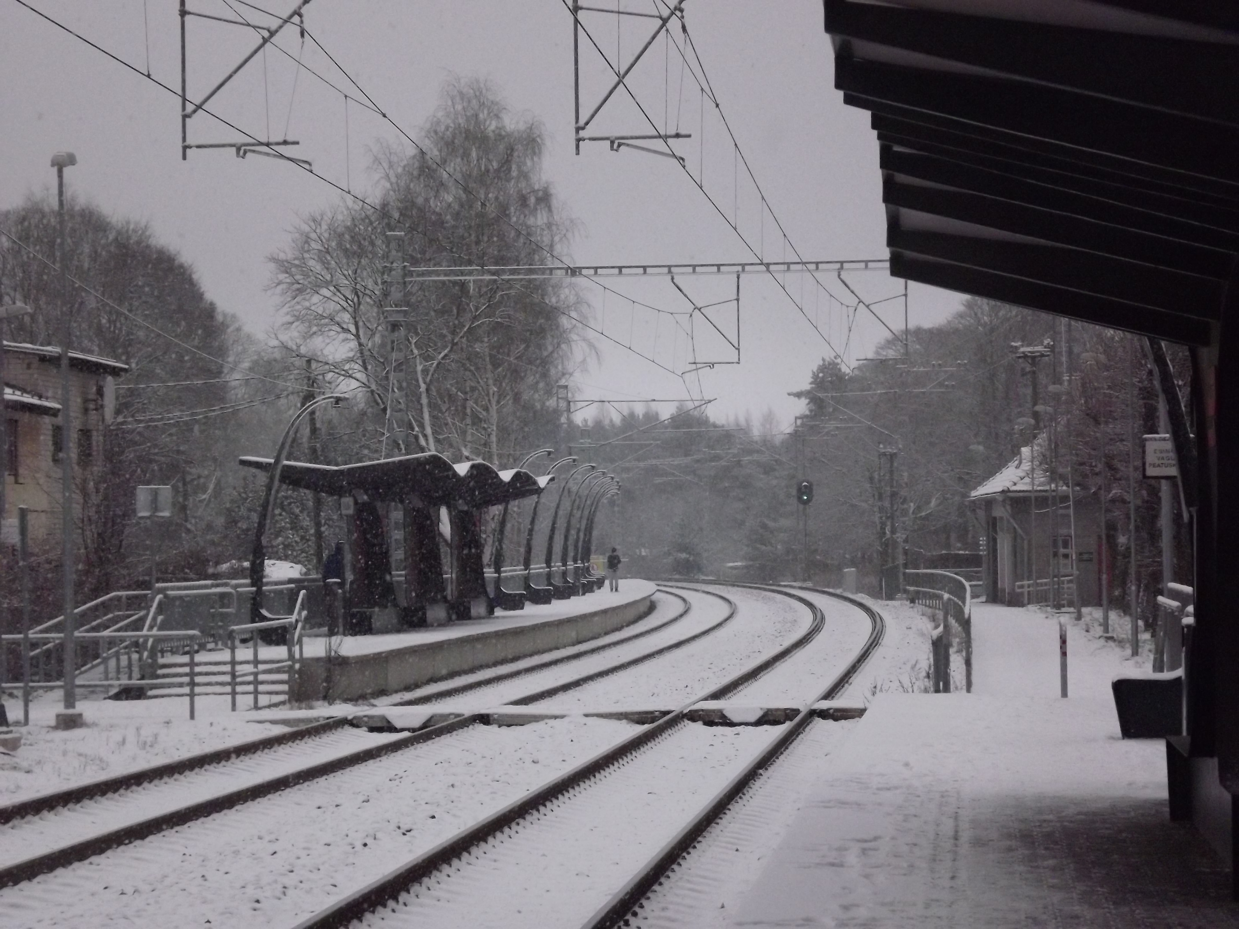 Rahumäe raudteepeatus aastal 2014.